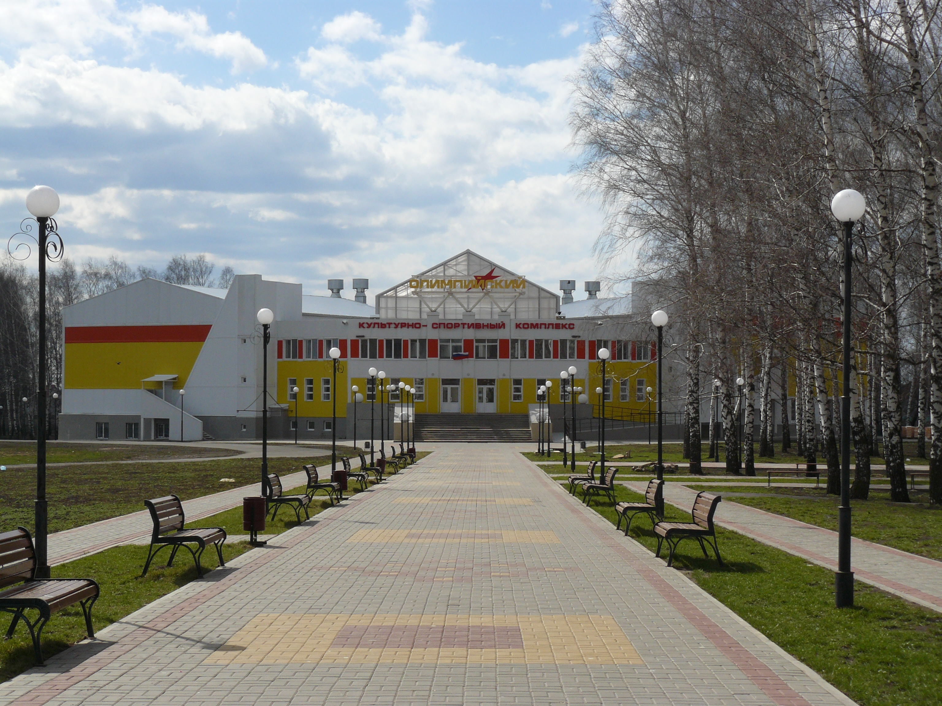 Культурно-спортивный комплекс "Олимпийский", с. Тербуны Липецкой области